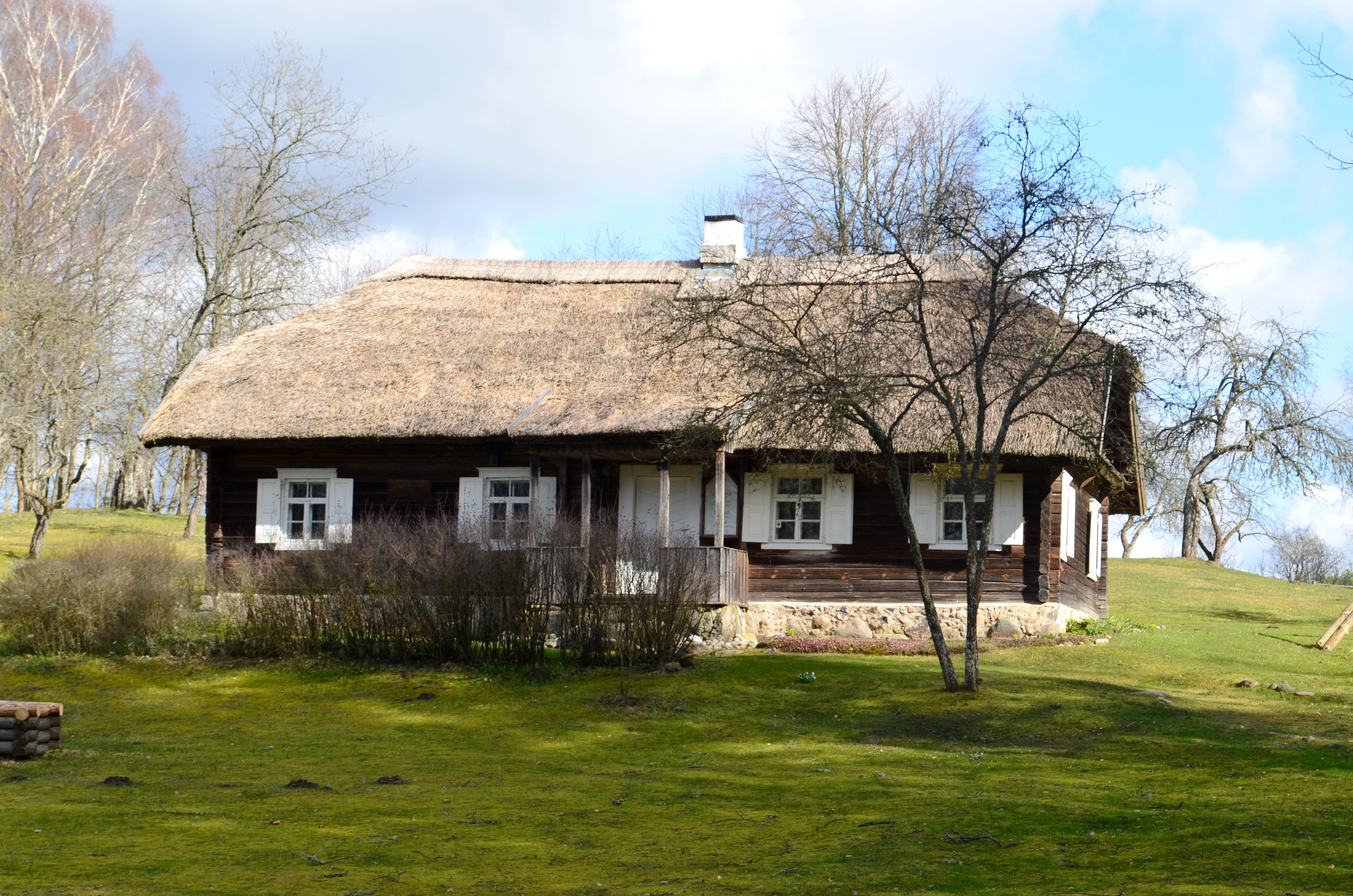 J. Biliūno sodyba, Niūronys, Anykščių raj.